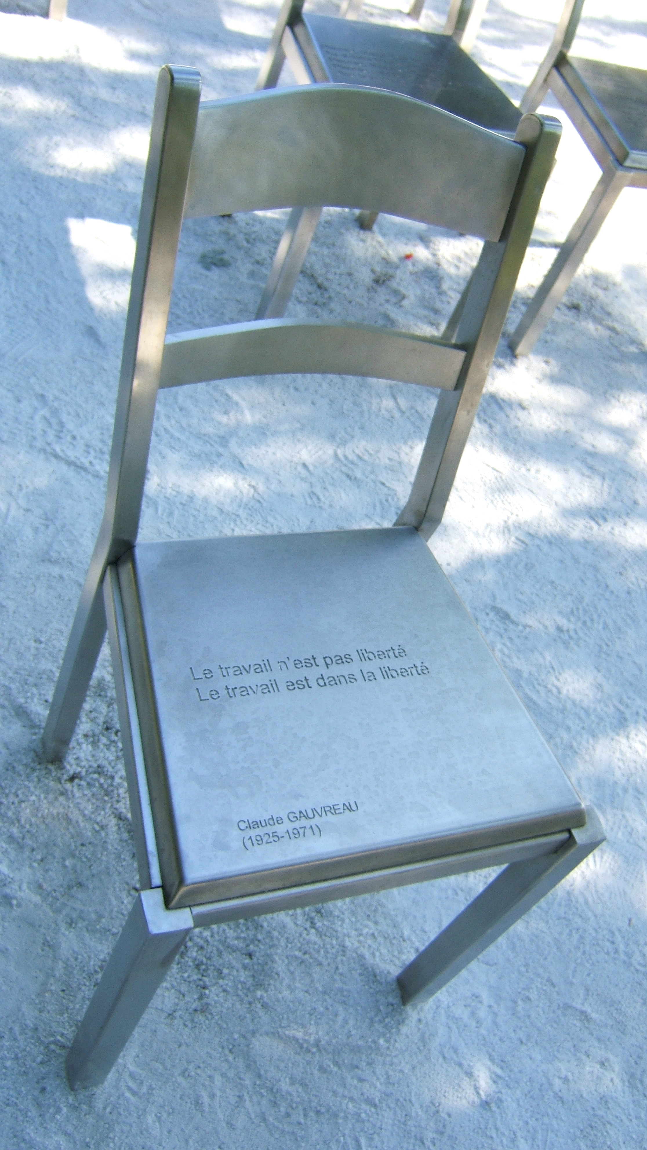 Phrase de Claude Gauvreau. Chaise exposée publiquement à Québec devant la gare du Palais.